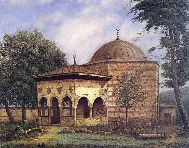 Mosque